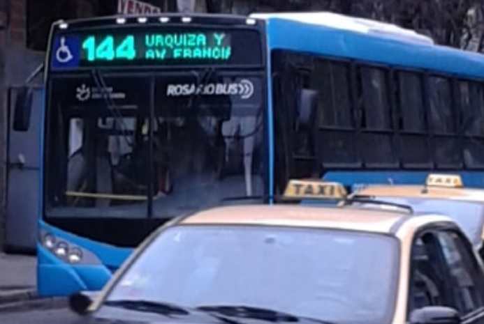 Omnibus Mercedes-Benz afectado a la línea 144, explotada por Rosario Bus